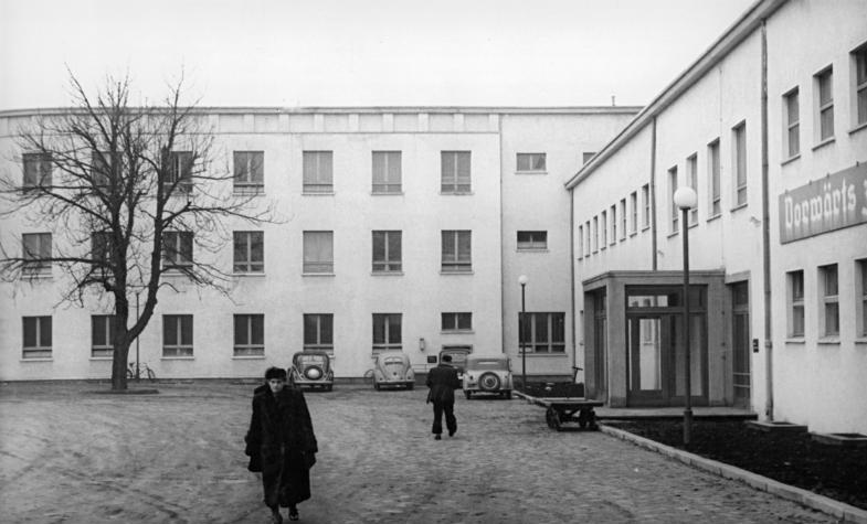 Berlin-Friedrichshain, Poliklinik, Eingang ADN-ZB Gielow 30.1.1953 Berlin: Eingang zur Poliklinik Berlin-Friedrichshain.